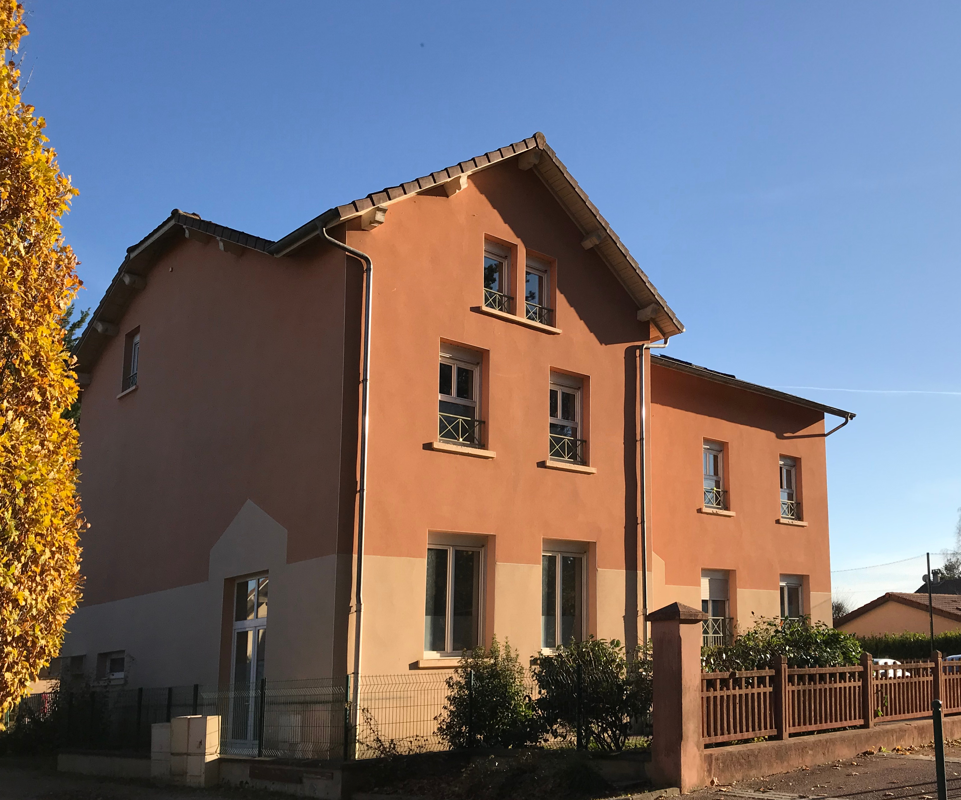 Maison d'enfants Les Planètes (Mollon, Ain, France).